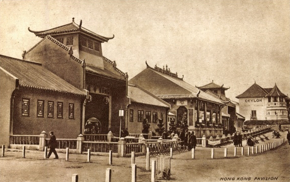 In Verbindung mit der Messe des britischen Kolonialreiches (British Empire Exhibition) veröffentlichte Ansichtskarte